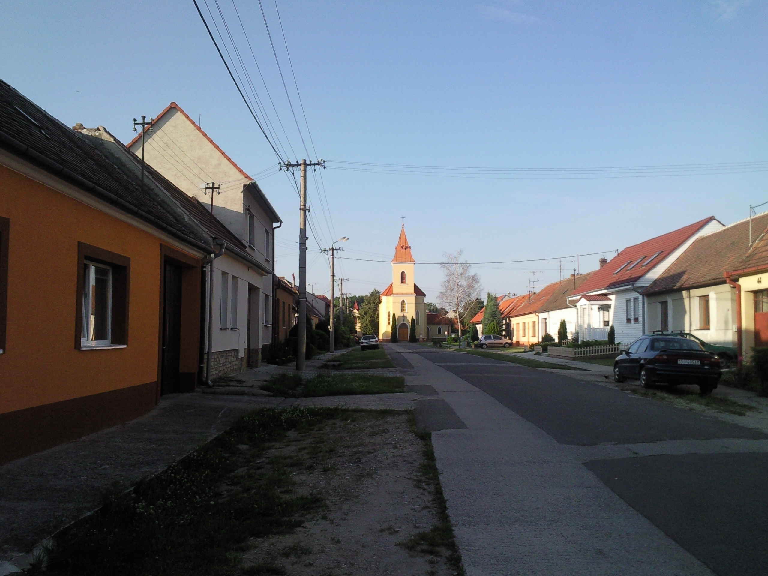 Kátov, Slovakia